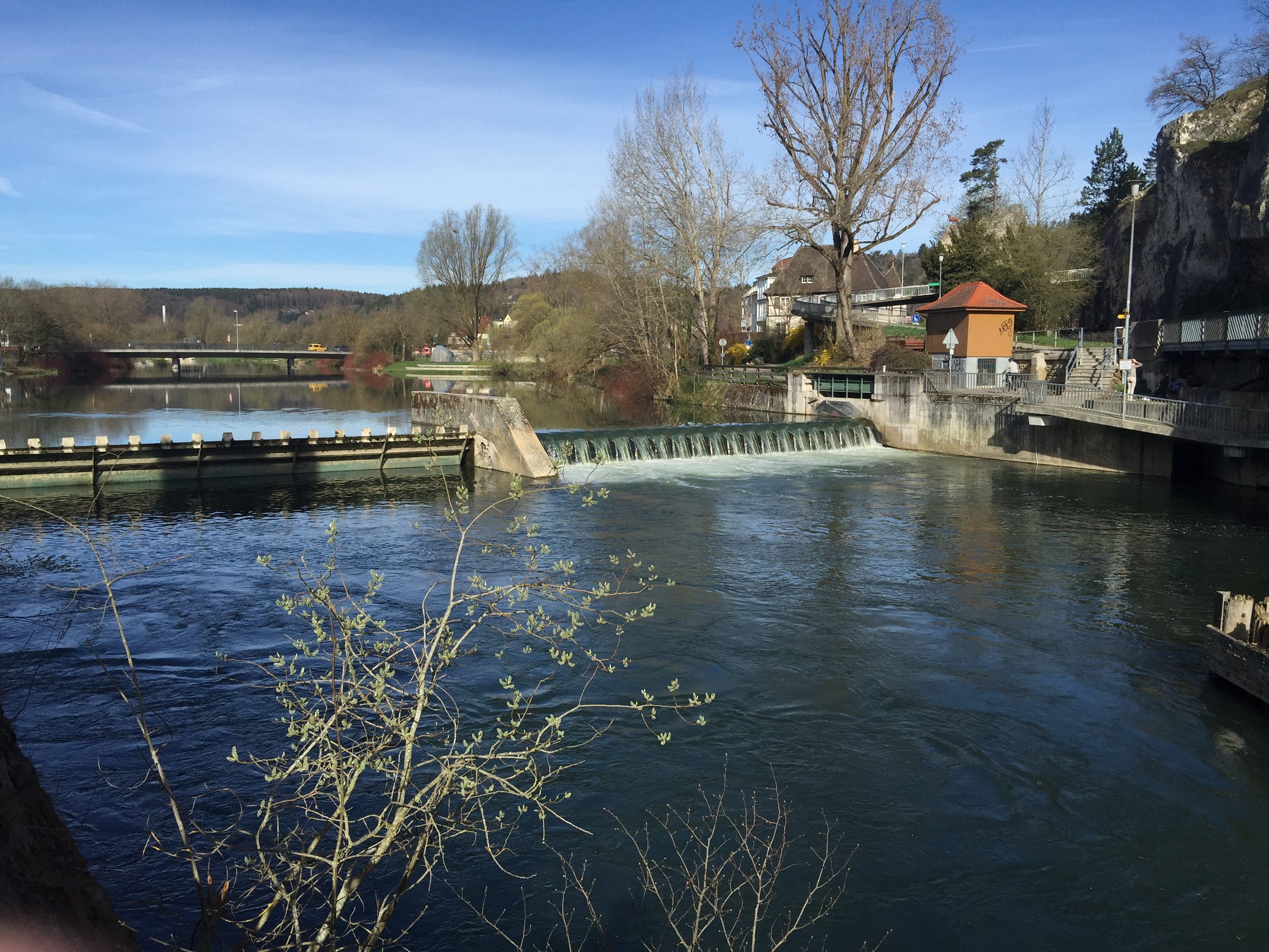 Wehr des Kraftwerks in Sigmaringen